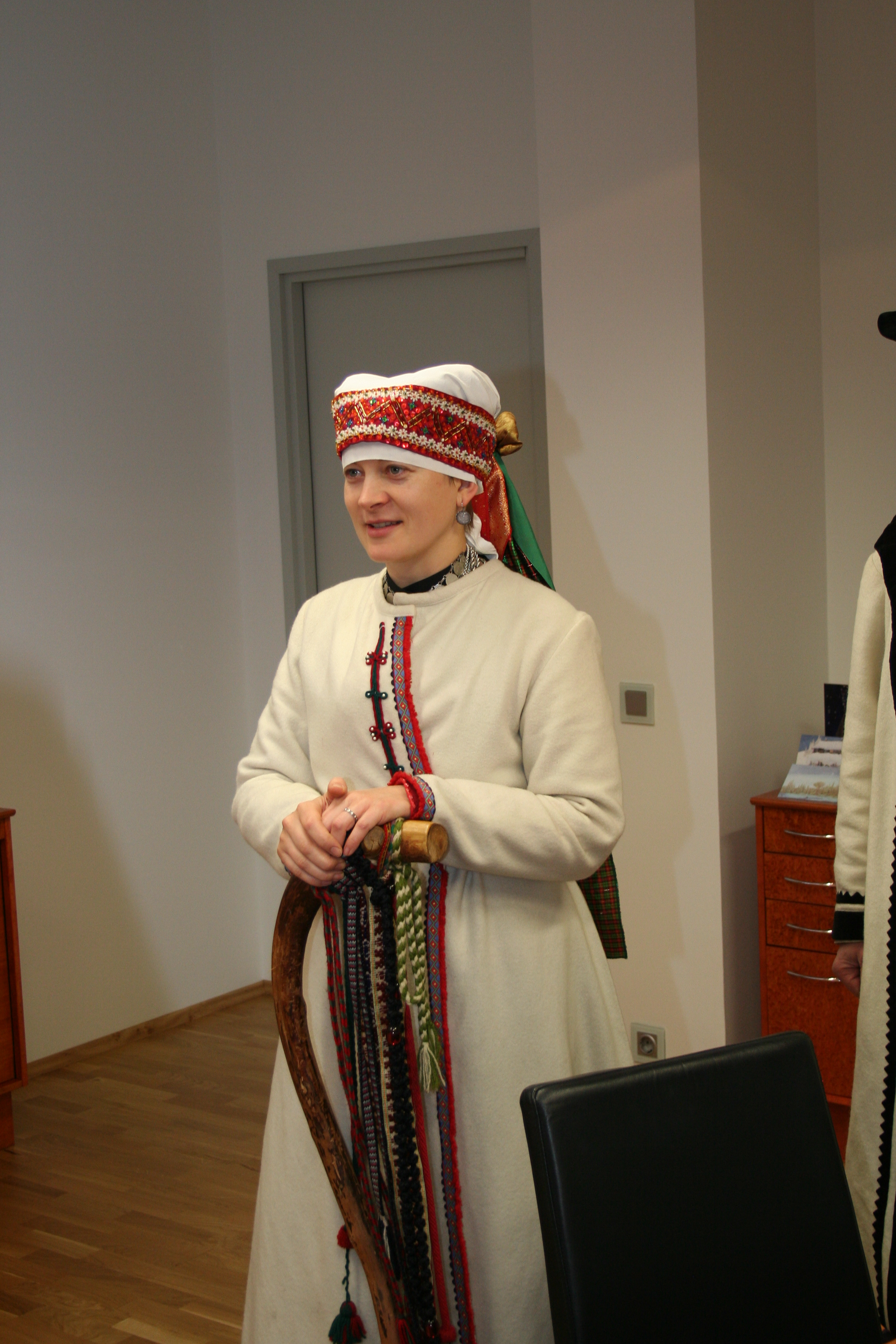 Võro: Setomaa ülembtsootska Jane Vabarna rahandusministeeriumih 17.12.2015